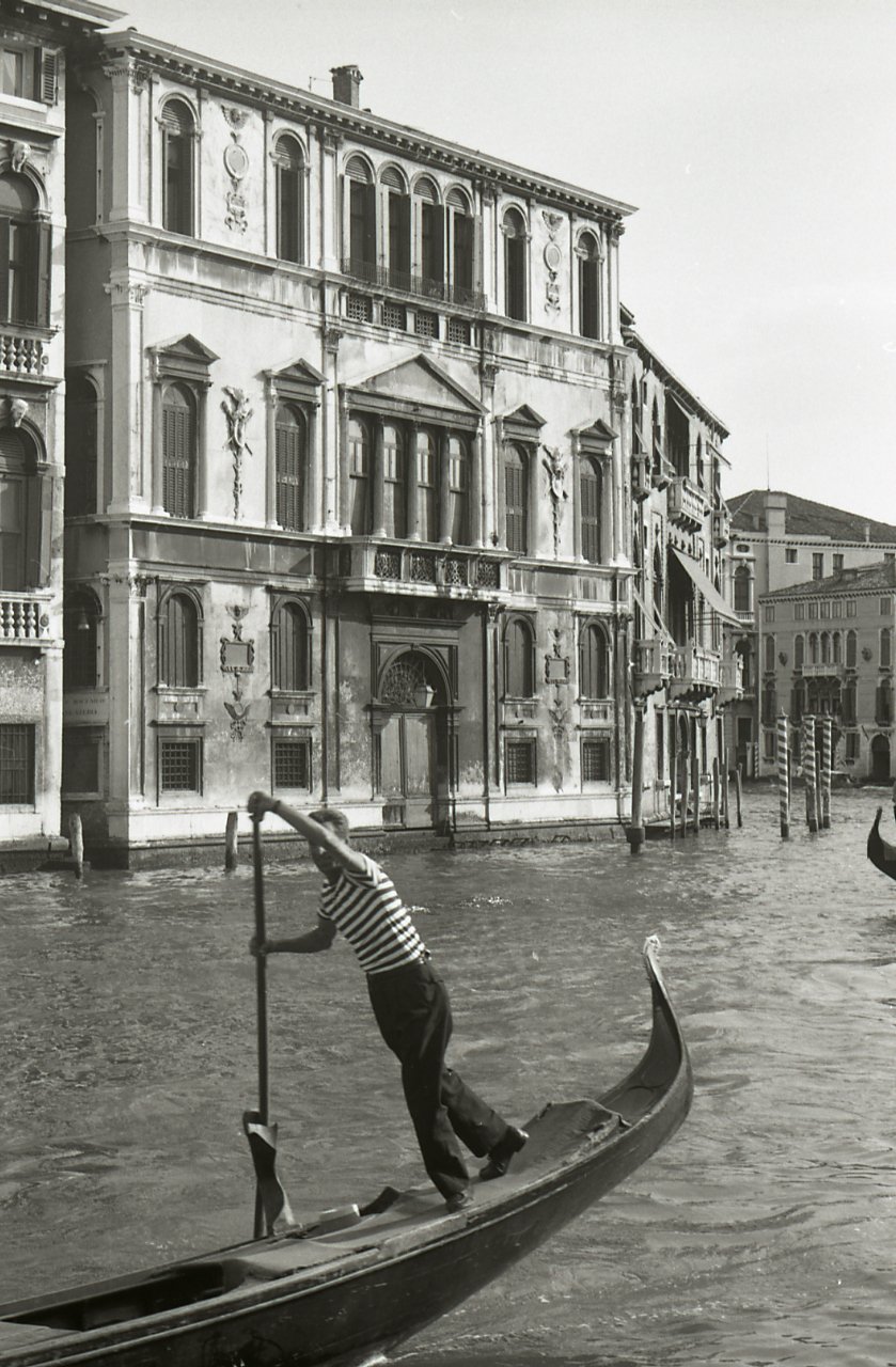 Serie fotografica : Venezia, 1969 / Paolo Monti. - Strisce: 7, Fotogrammi complessivi: 38 : Negativo b/n, gelatina bromuro d'argento/ pellicola ; 35 mm. - ((I fotogrammi hanno una doppia numerazione. . - Sul portanegativi: Nikon Pan FP4 Ilford. - All'interno del portanegativi Monti specifica alcuno soggetti. - Fonte: Agenda di Paolo Monti: Monti - Agenda 1969 (1969), presso Archivio Paolo Monti